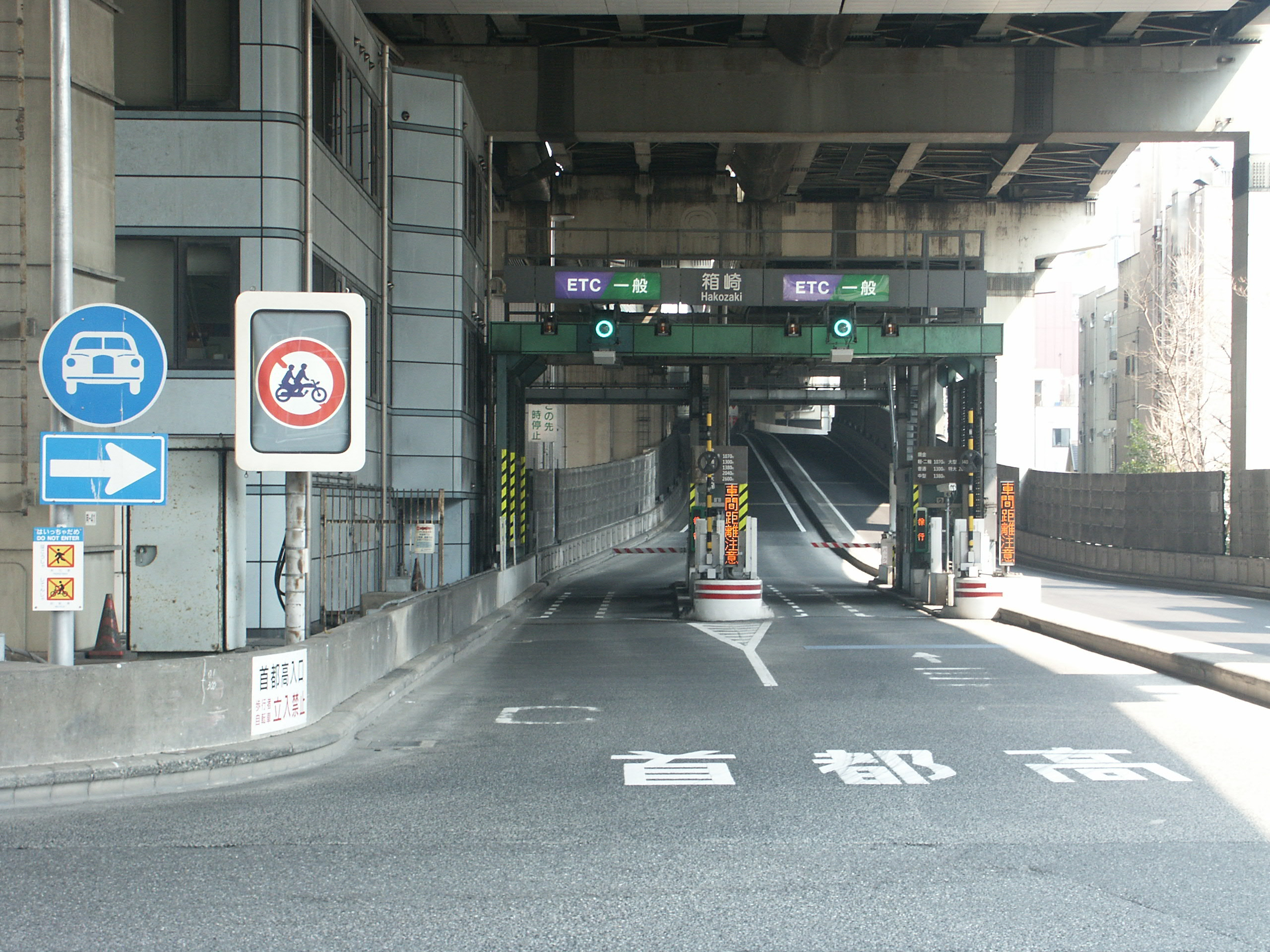 首都高速道路箱崎出入口(料金所付近を撮影)